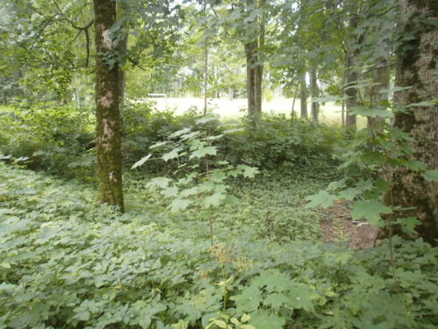 Vaade linnusealalt 1 m sügavuseni tasandatud lõunapoolsele vallikraavile.